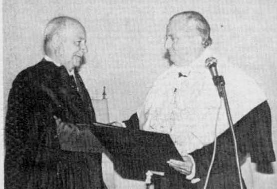 Photo of Adonias Filho receiving his "doctor honoris causa" from Universidade Federal da Bahia, Brasil